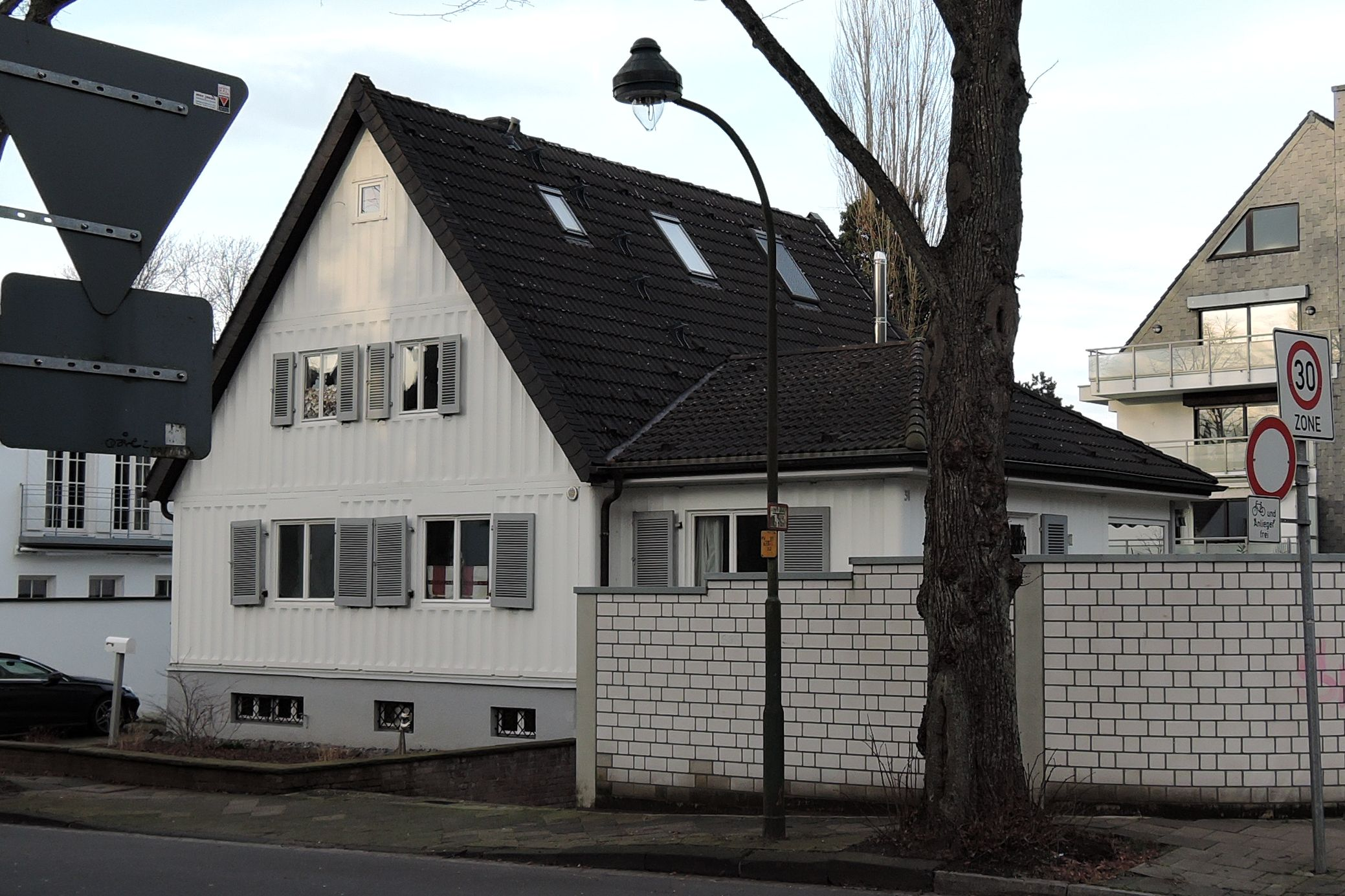 Gebäude Reichswaldallee 31 ("Stahlhaus") in Düsseldorf.